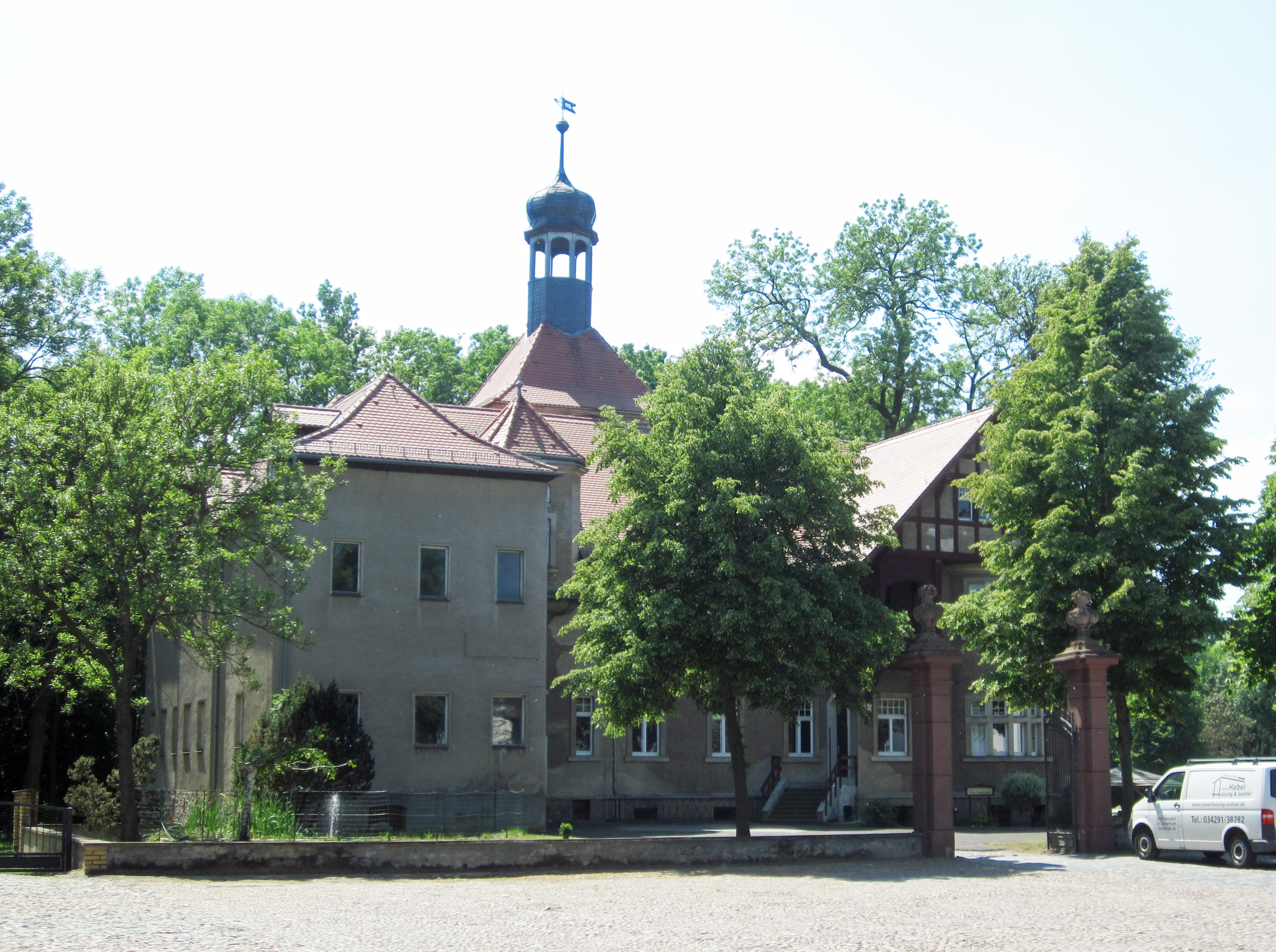 Schloß Plaußig, Plaußiger Dorfstraße 12, Herrenhaus